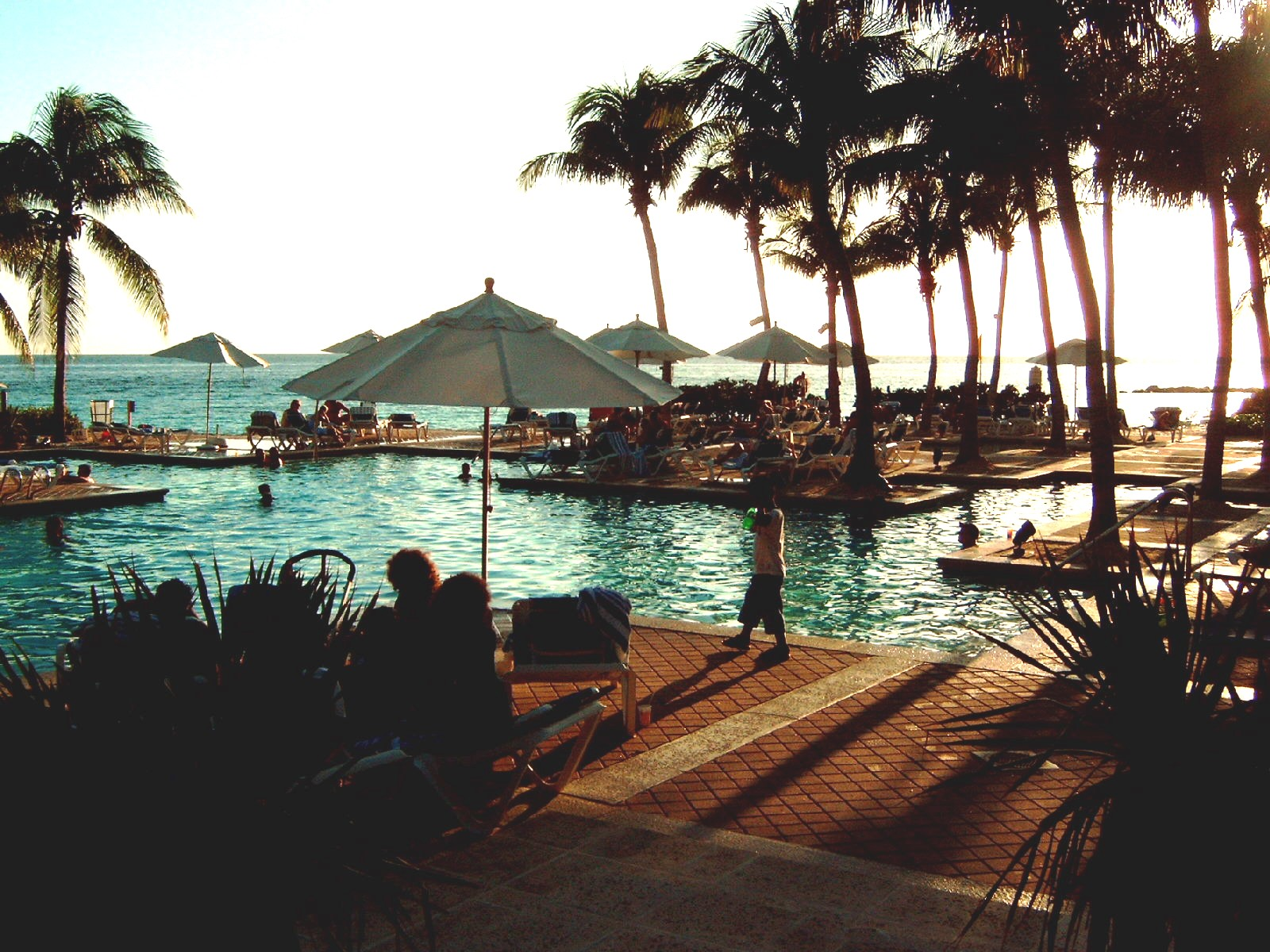 Caribische zee en zwembad Marriott Hotel, Curacao, 26 oktober 2005. Eigen opname, vrijgegeven voor publiek domein.